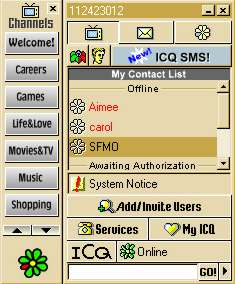 Монгол: s